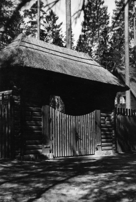 Prop.-Kp. 612; Bildberichter: Sepp Jäger; Text: Uetrecht; Ort: Rominten/Opr.; Datum: 2.6.41; Text: Rominter Heide, Eingang und Pförtnerhaus zum Reichsjägerhof Rominten.